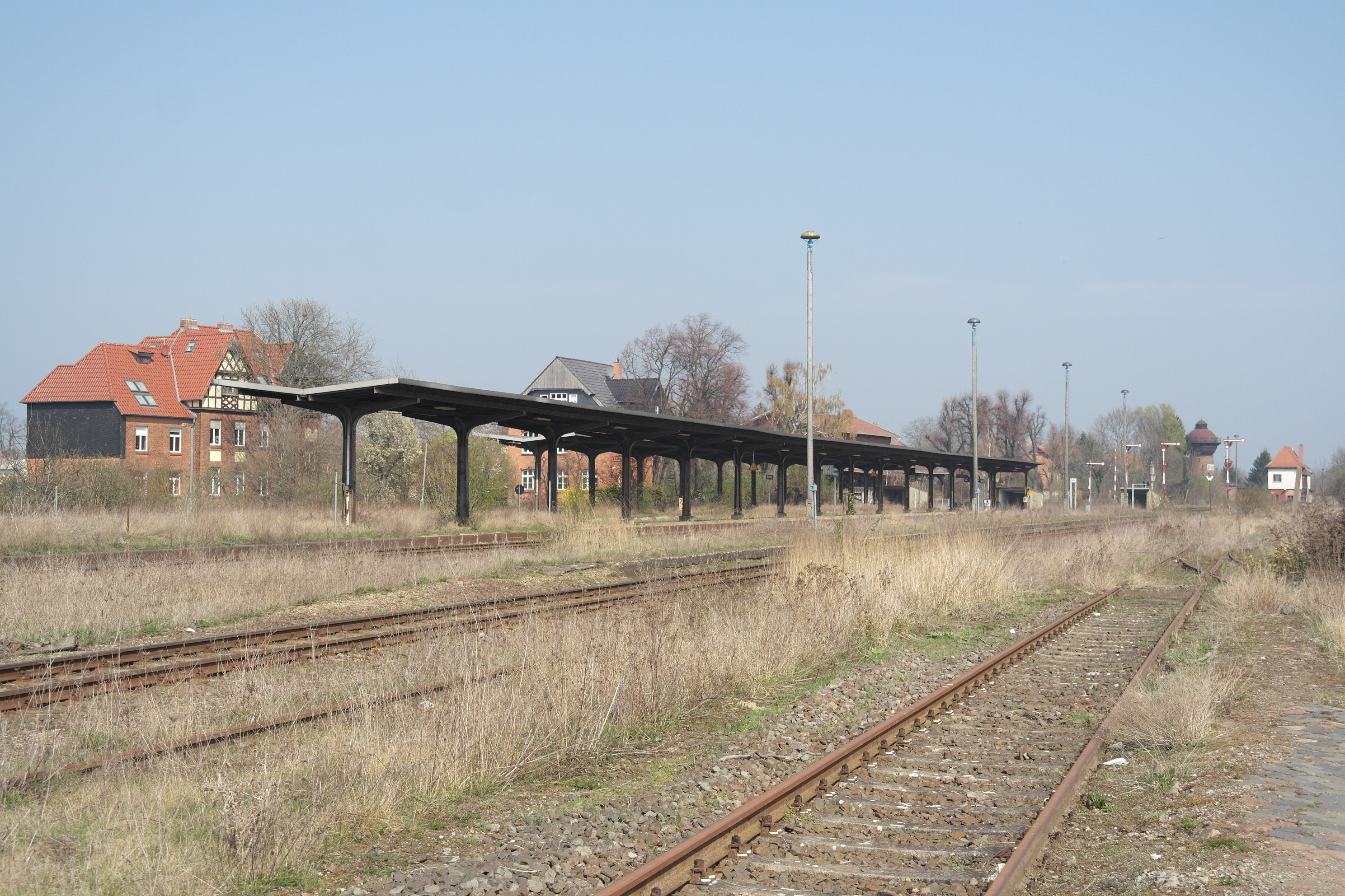 Bahnhof Blumenberg, Blick von Südwesten auf Bahnsteige und Empfangsgebäude